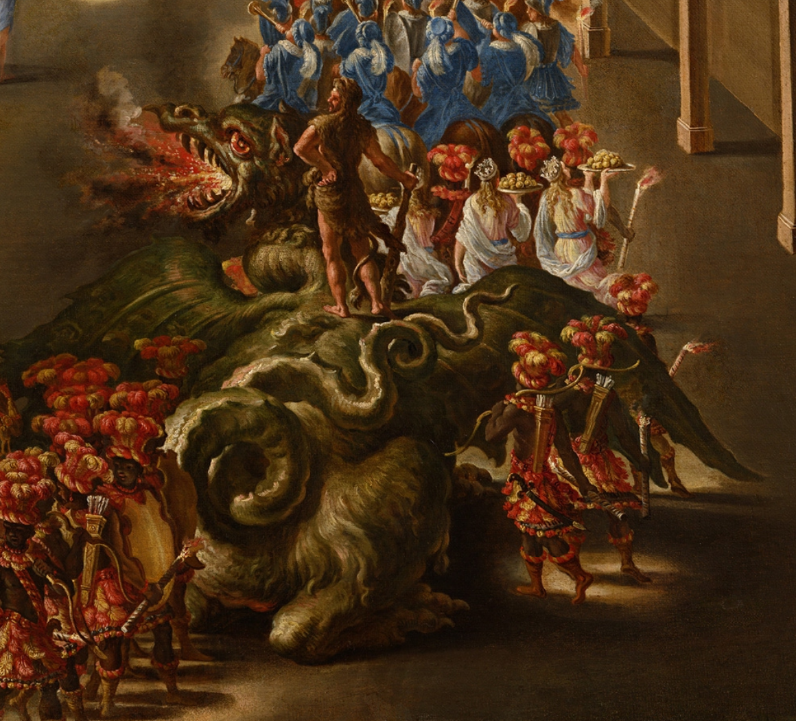 Carro di Ercole - Dettaglio del dipinto La Giostra dei Caroselli, opera che raffigura la sfarzosa parata allegorica organizzata a Palazzo Barberini, durante il carnevale del 1656, in onore di Cristina di Svezia da poco giunta a Roma dopo l'abdicazione dal trono svedese